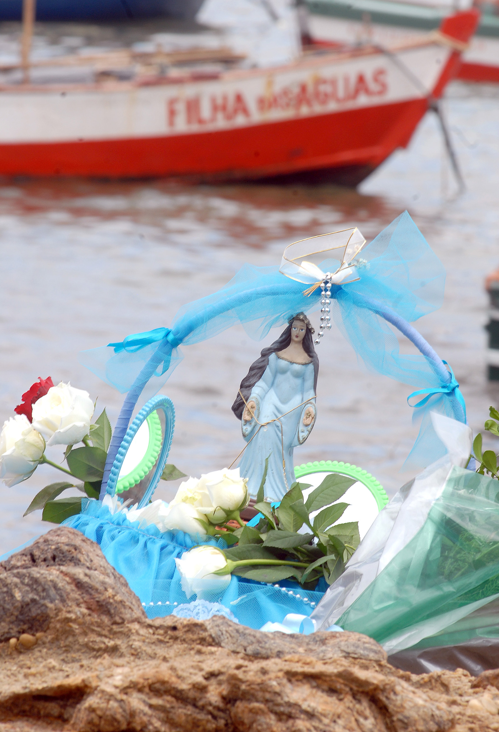 Presente de Iemanjá na Praia do Rio Vermelho, Salvador, Bahia, Brazil